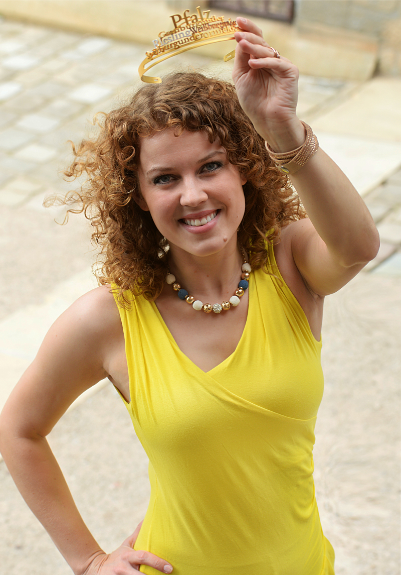 Portrait der Pfälzischen Weinkönigin Anastasia 2016/17